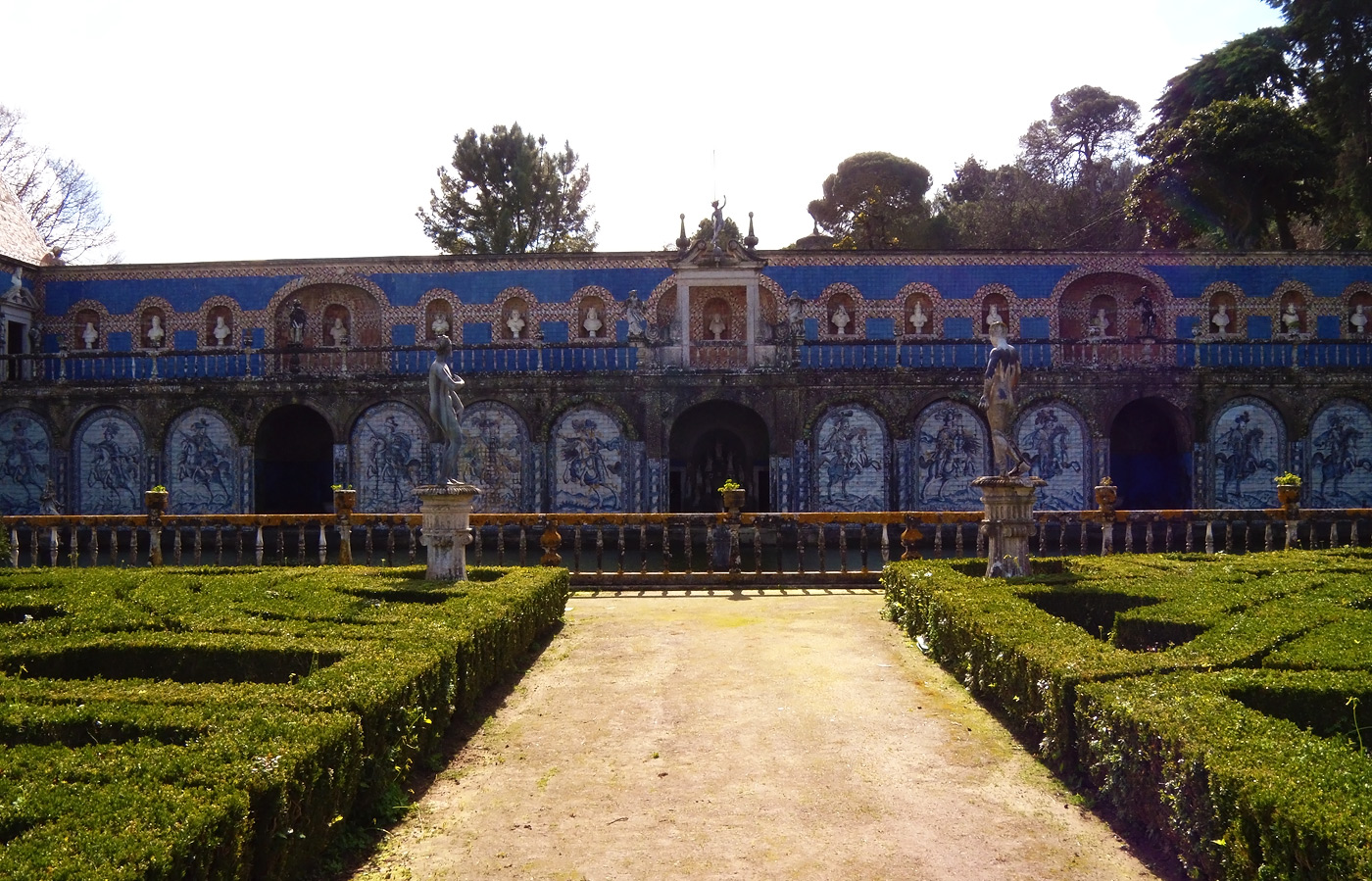 В саду Дворца Фронтейра